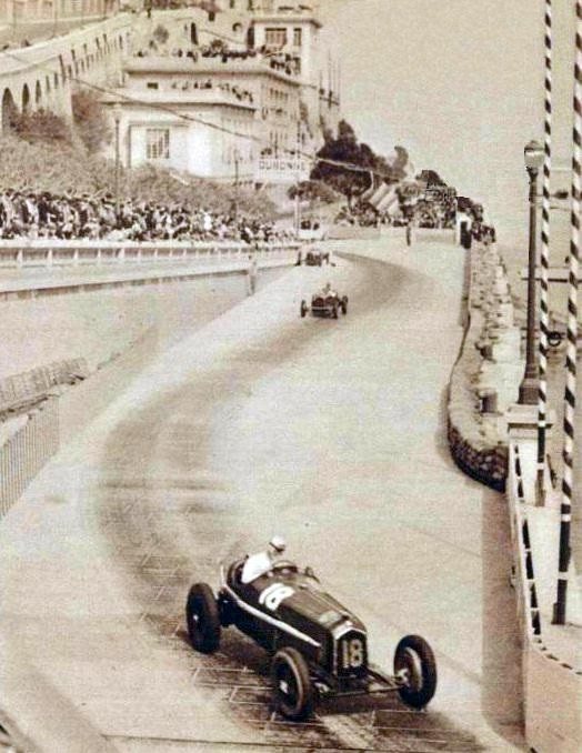 René Dreyfus à la chicane du quai Albert 1er, Grand Prix de Monaco 1935.